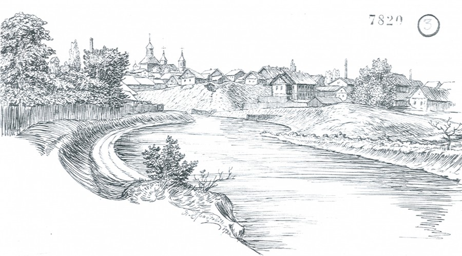 Беларуская (тарашкевіца): Рака Сьвіслач ля Замкавай гары Папера, туш, пяро. 13,2x20,8 Нацыянальны мастацскі музей, Мінск